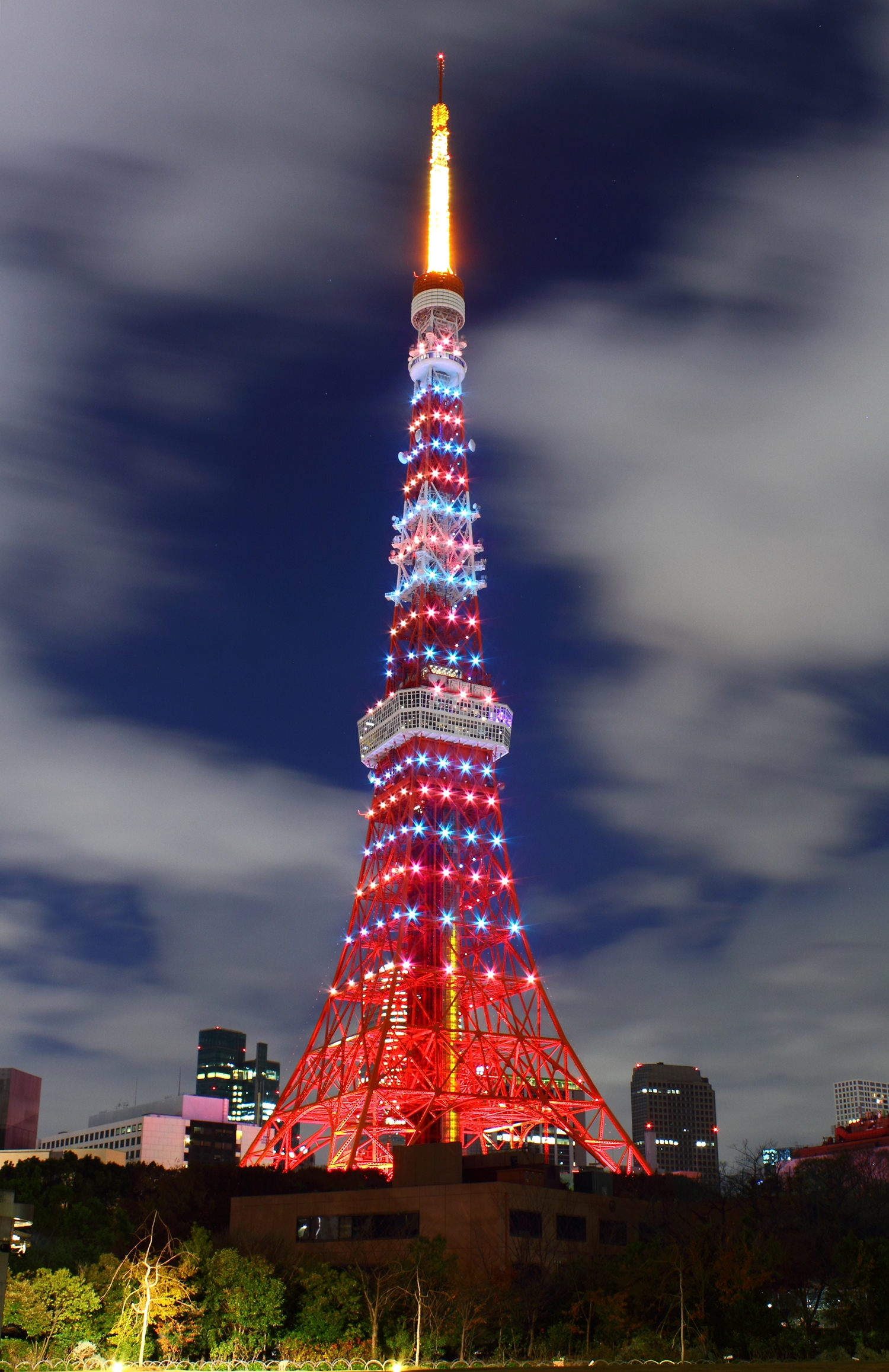 東京タワー、ダイヤモンドベール